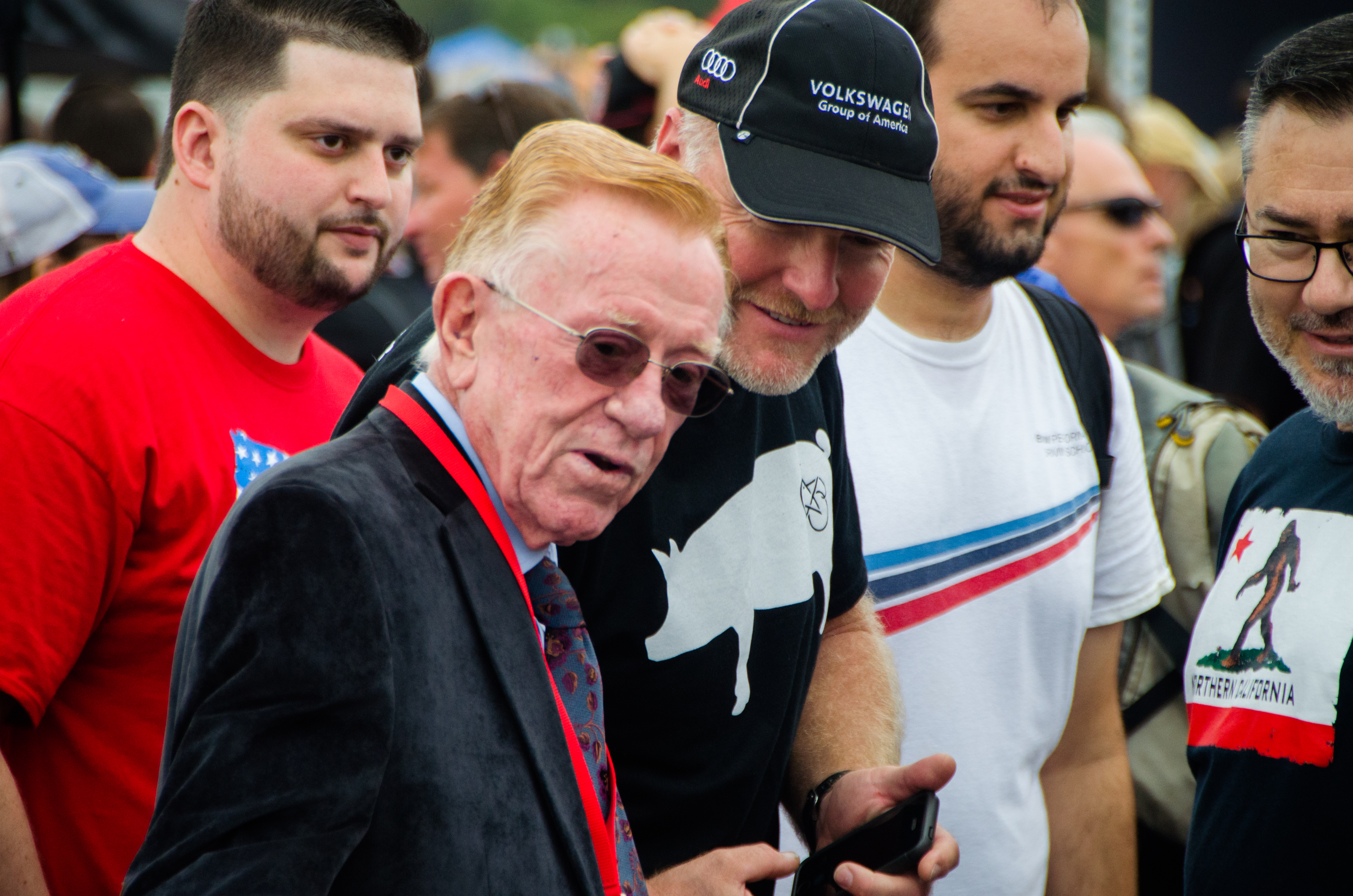 Don Panoz at Petit Le Mans 2017